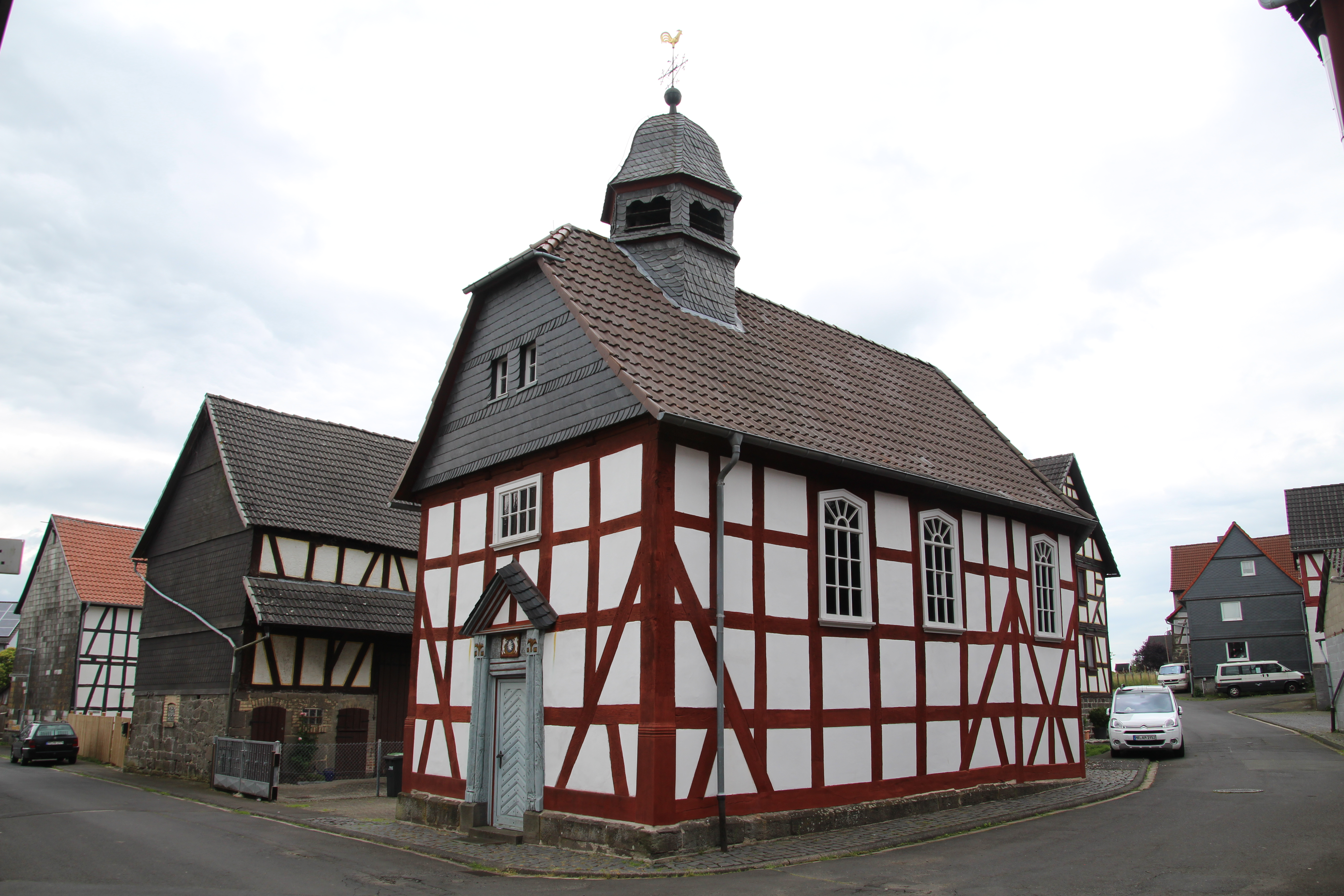 Siehe Bild und Dateiname